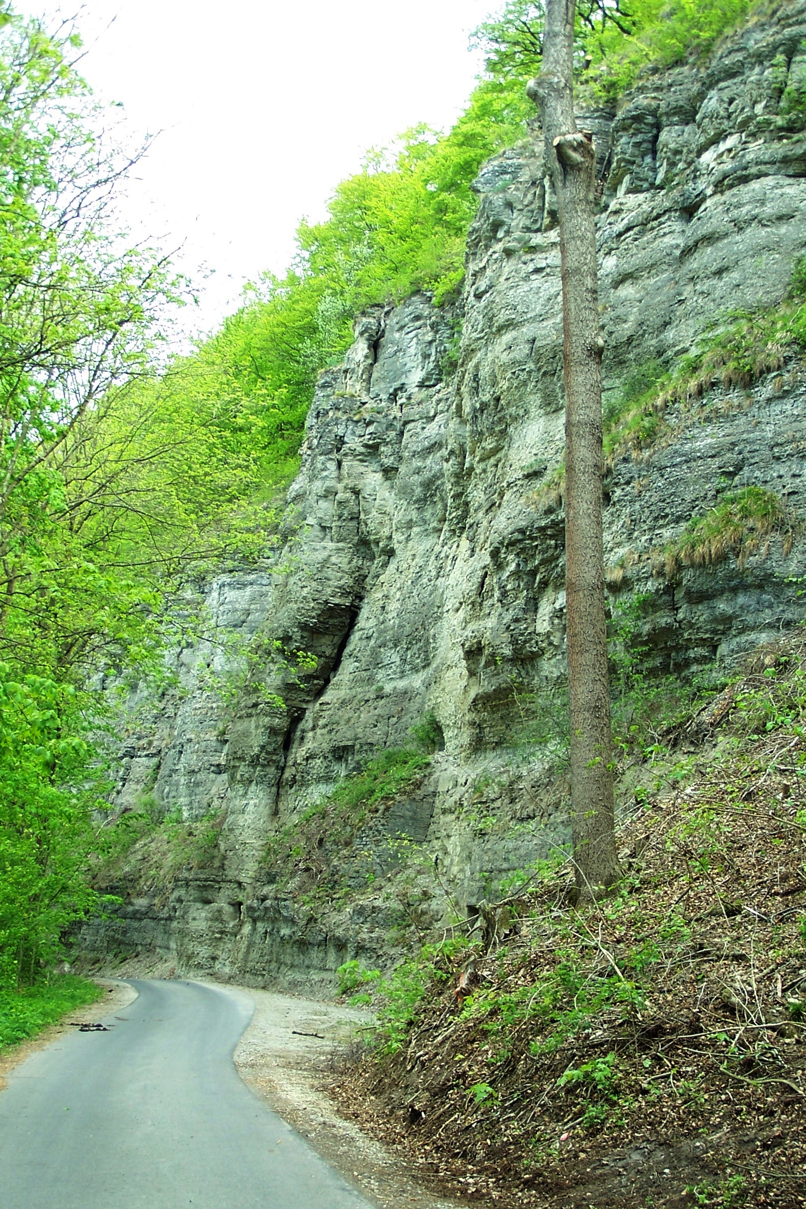 Die Falkener Klippen am Werraufer bei Probsteizella.